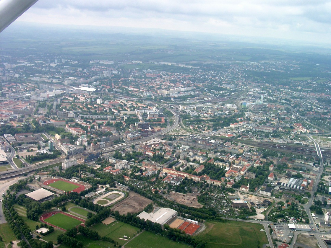 Luftbild von Dresden, Blickrichtung Sueden